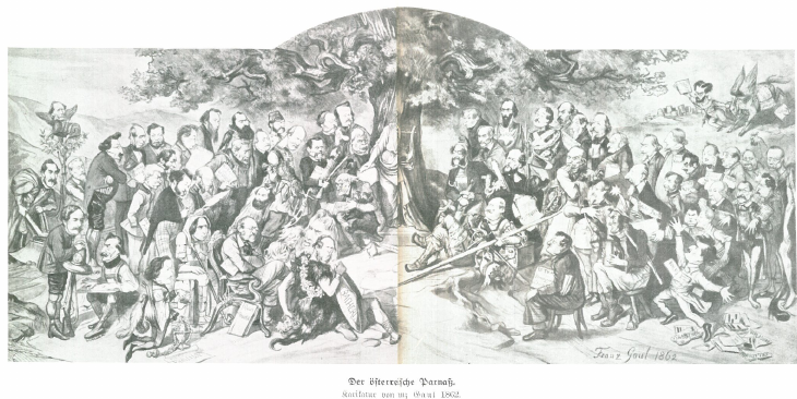 Franz Gaul Der österreichische Parnass 1862. Legende zu dem Bild von Eduard Castle siehe File:Franz Gaul Der österreichische Parnass 1862 Legende.jpg